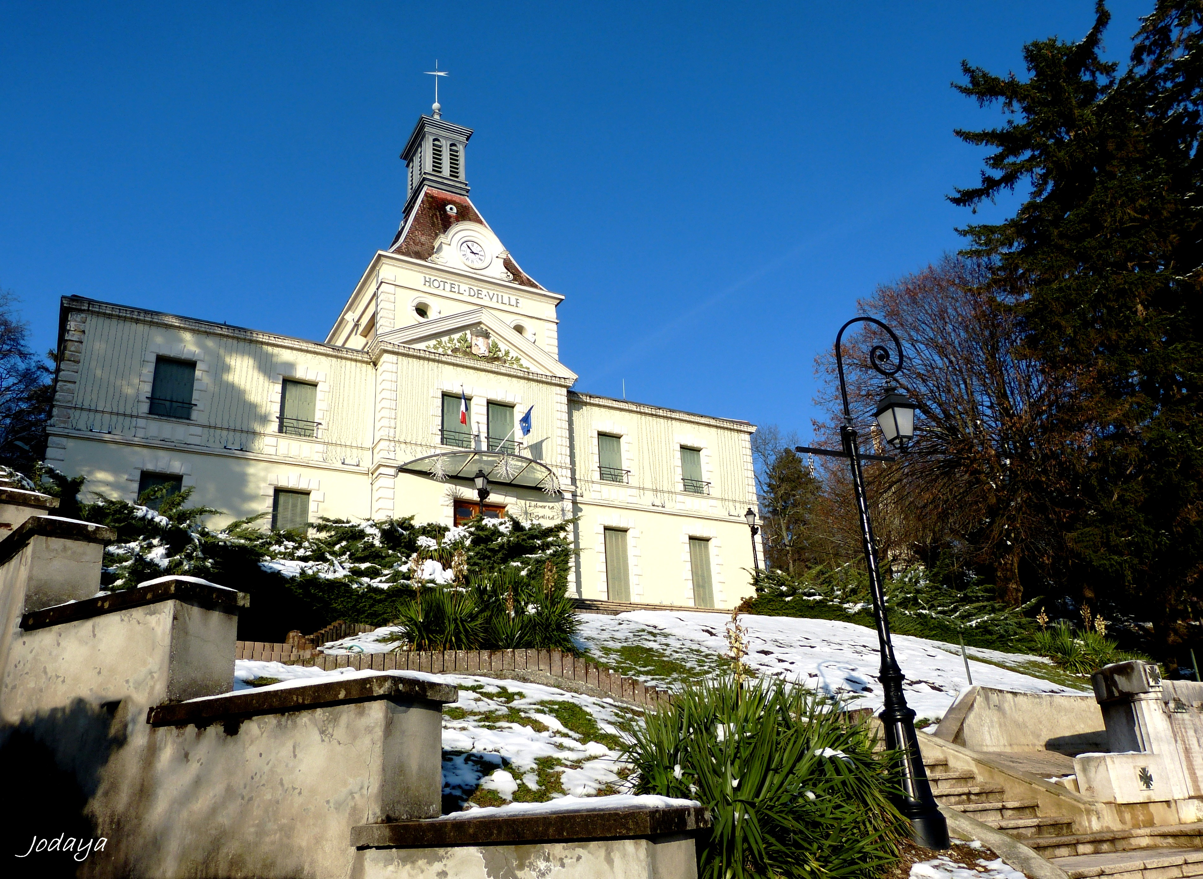 Saint-Jean-de-Bournay. L'hôtel de ville.